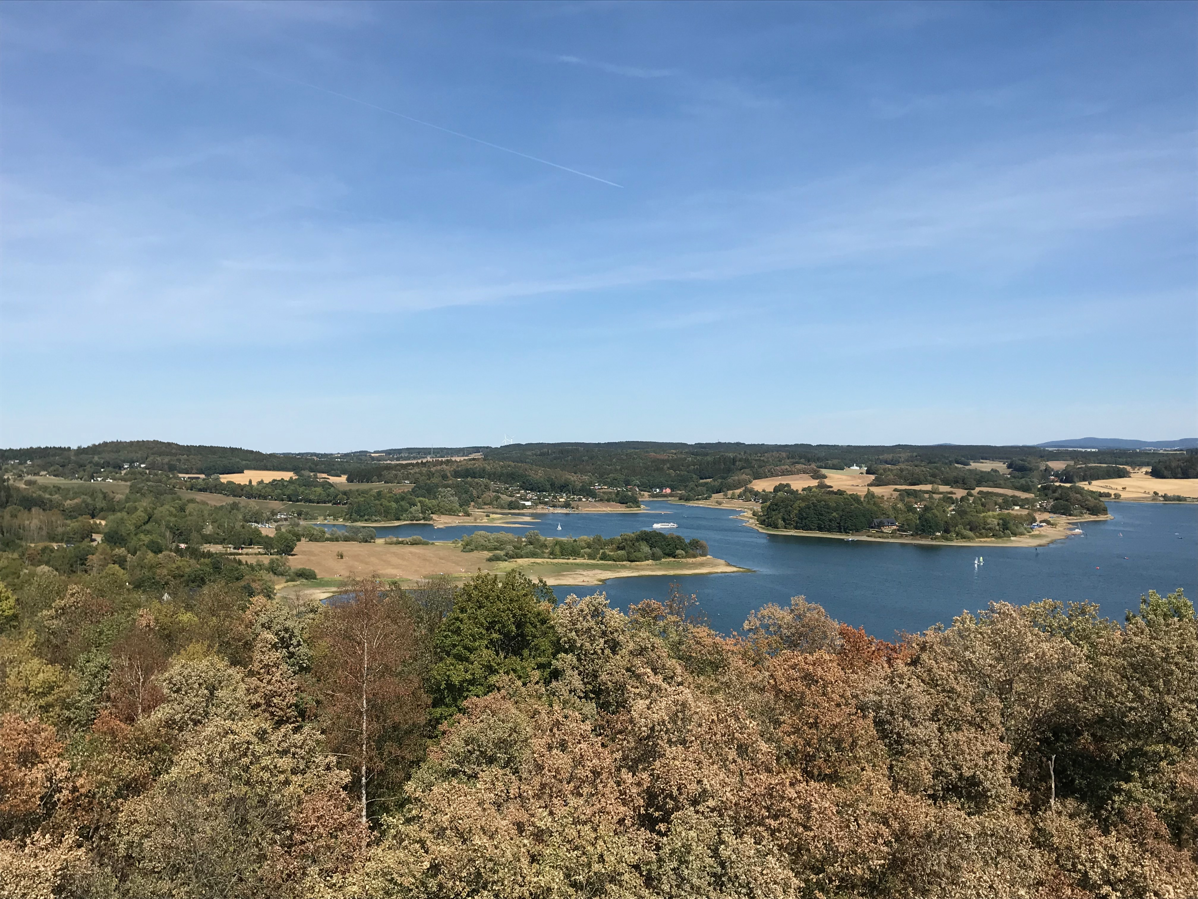 Blick vom Mosenturm auf Rodlera